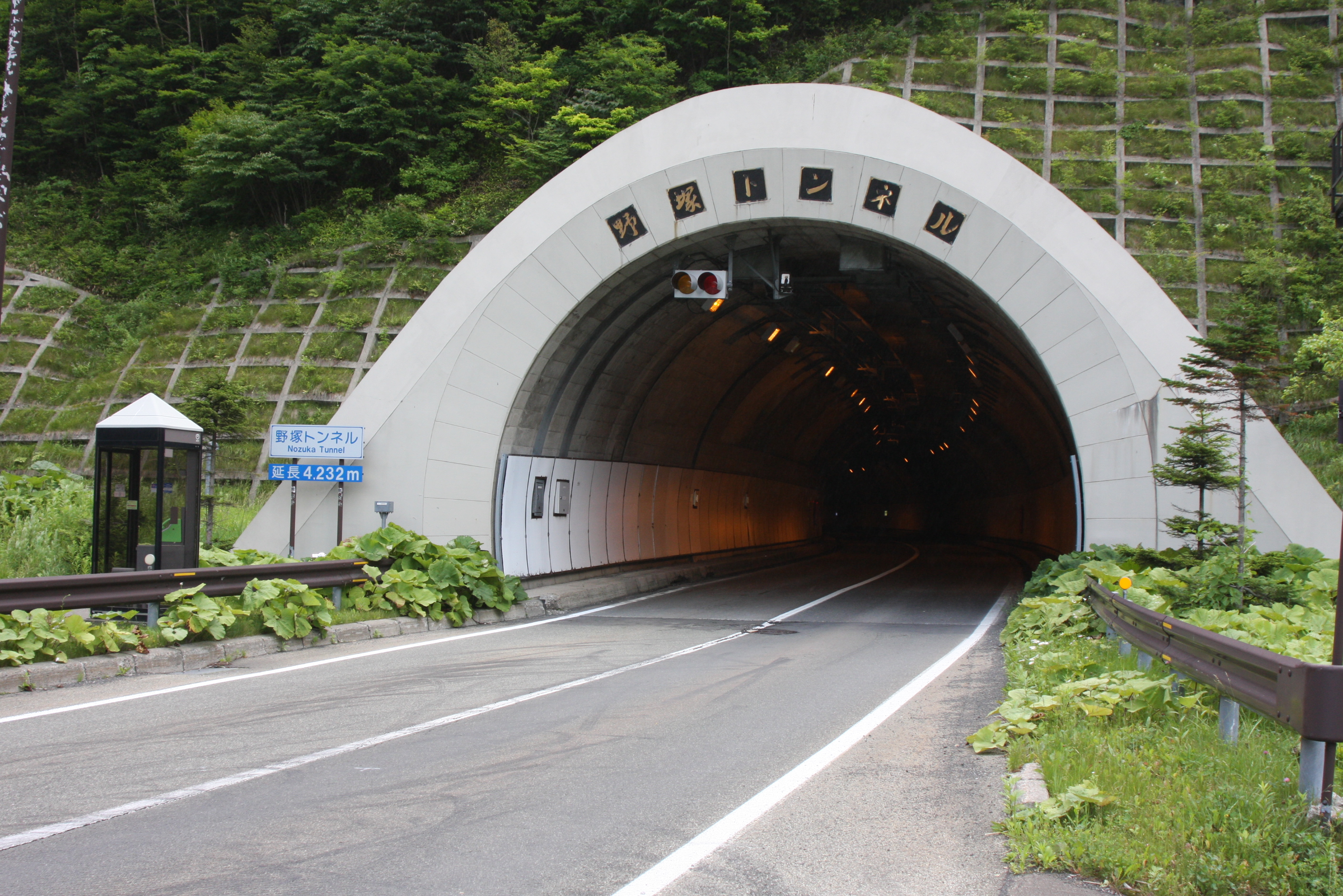 野塚トンネル（日高側入口）